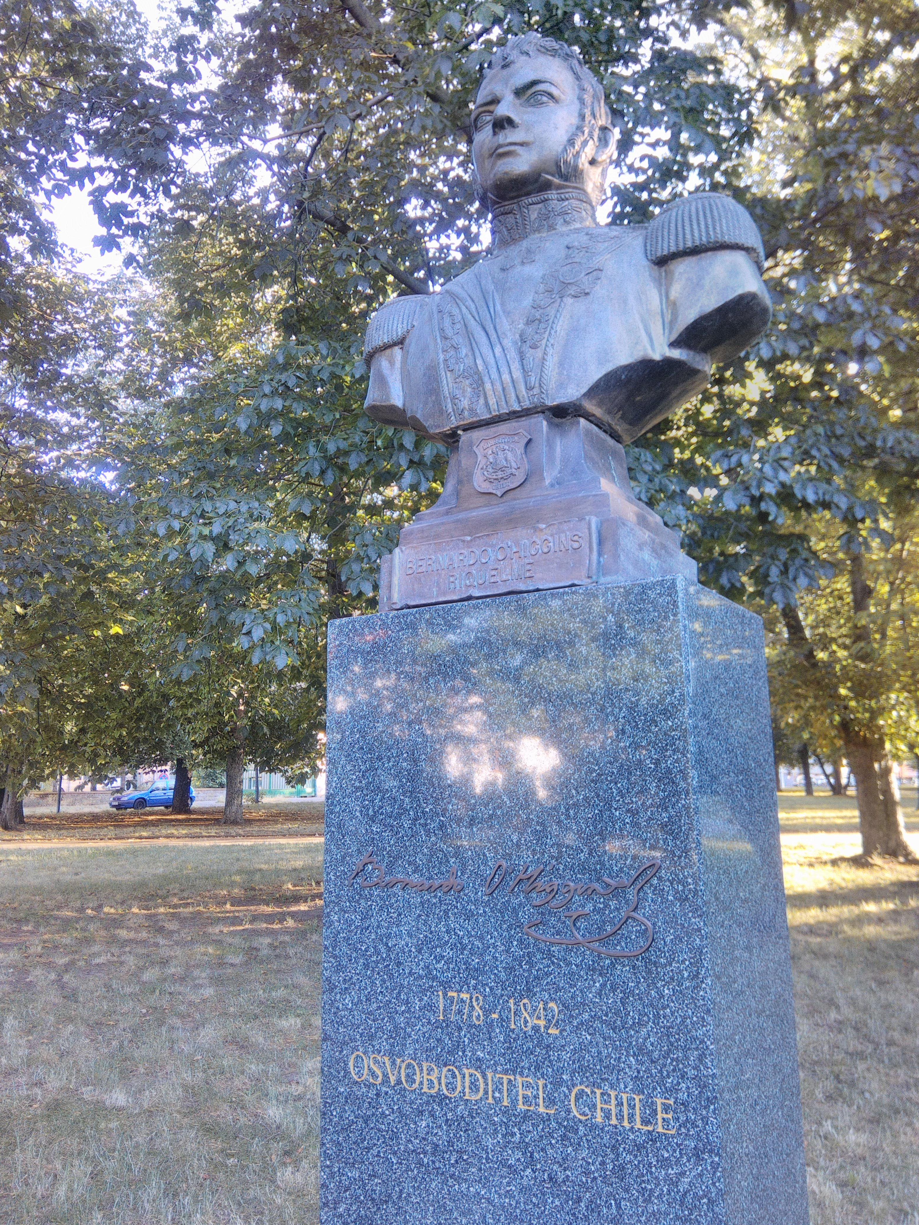 pomník v pražské Bubenči.